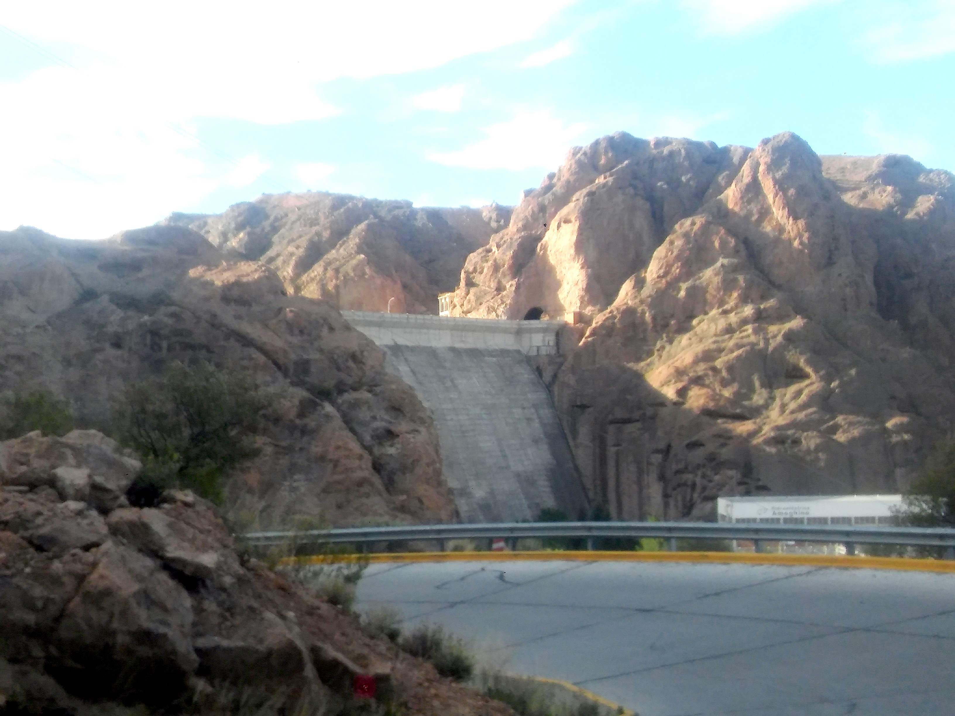 Murallon del dique desde la villa